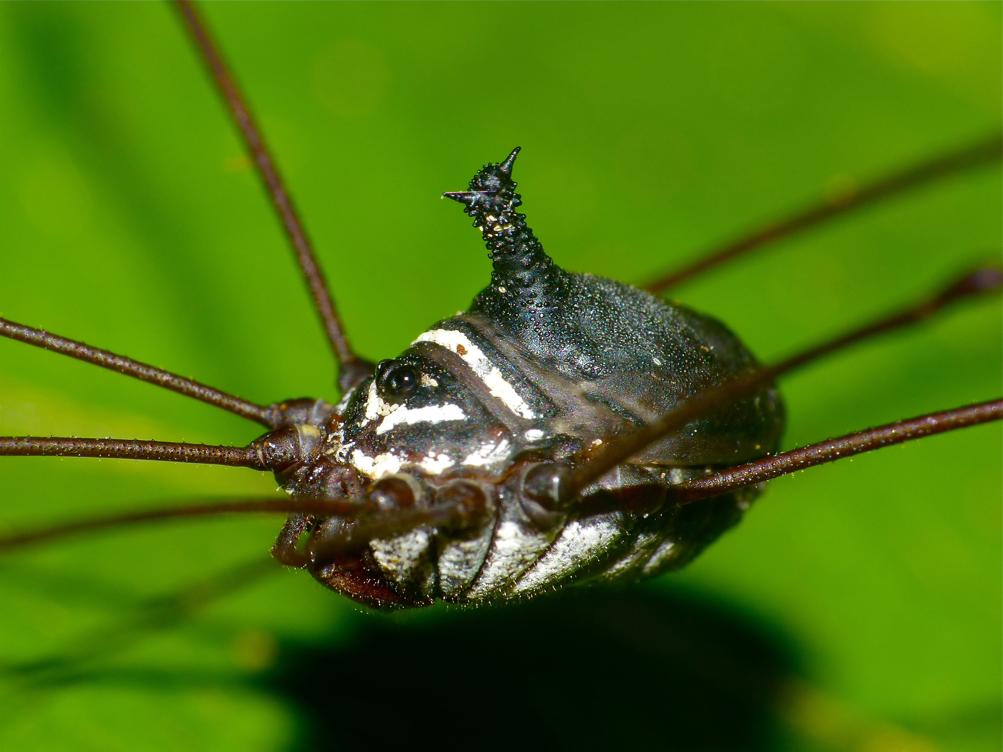 Night Walk Trail, Mulu NP, Sarawak, MALAYSIA